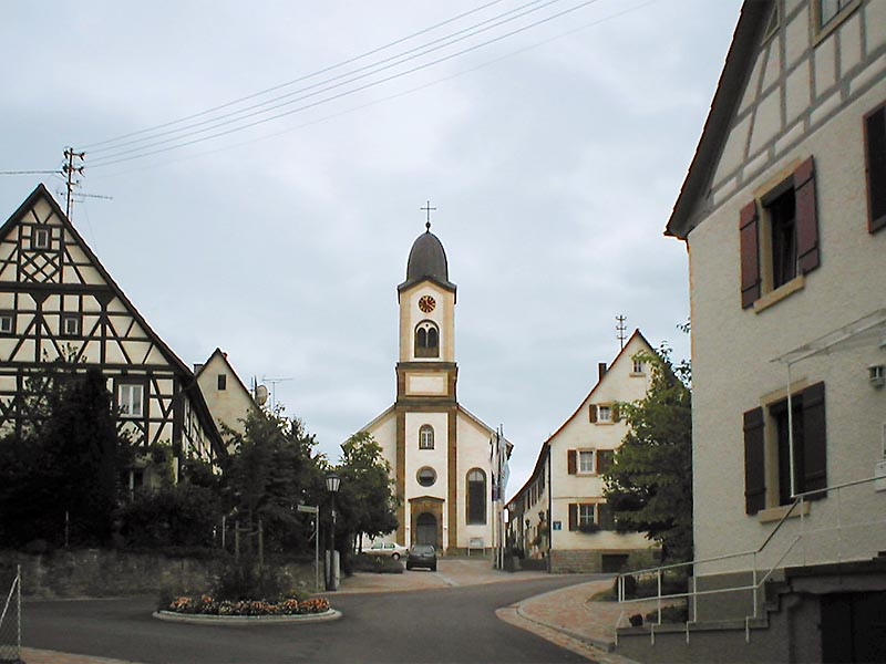 Ortsmitte von Untergriesheim mit kath. Kirche St. Johannes Baptista von 1840 und Rat- und Schulhaus von 1860.